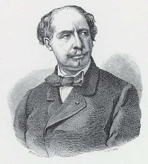 Ritratto di Ferdinando Arborio Gattinara di Breme